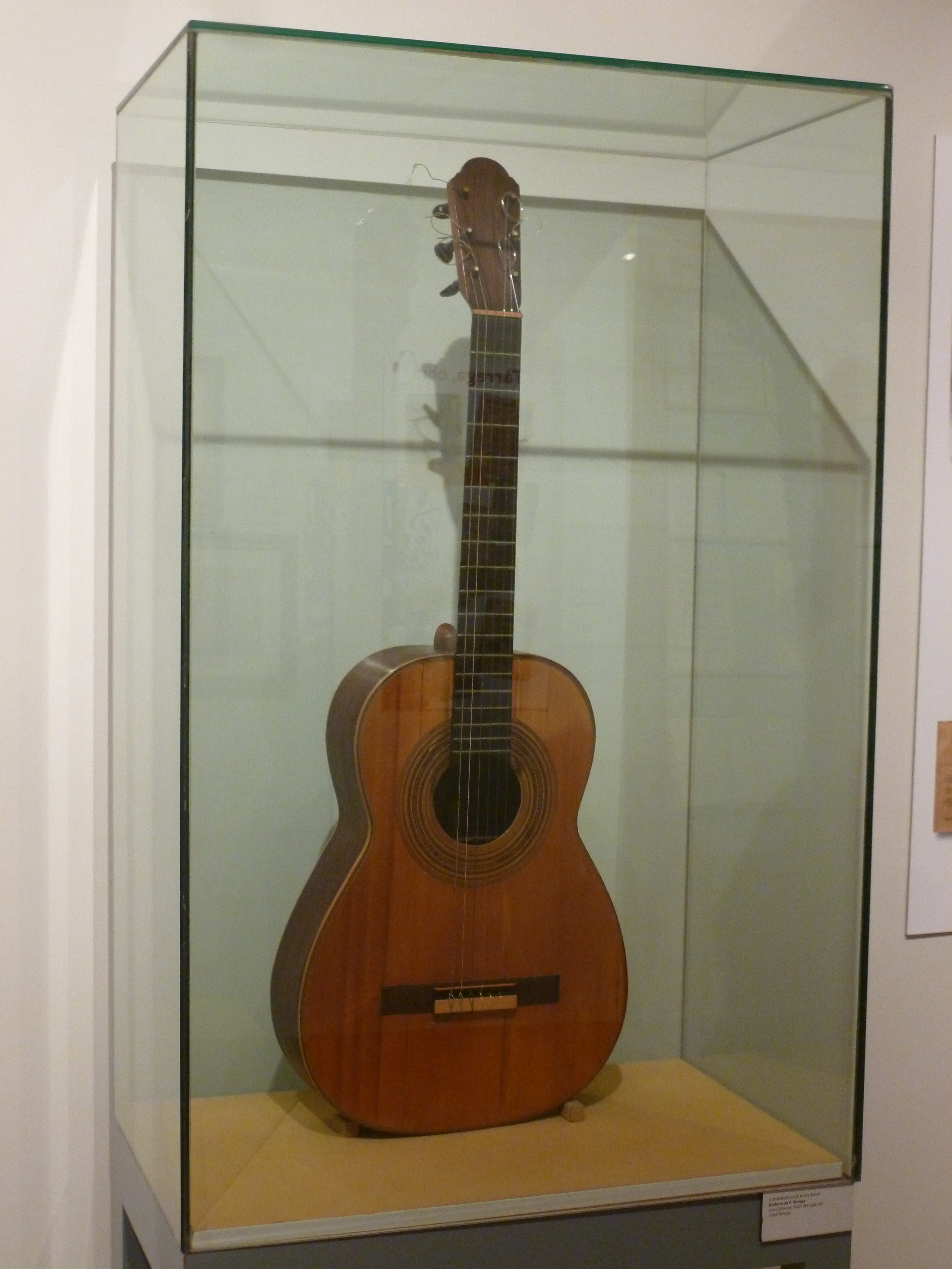 Guitarra de Francisco Tárrega. Fabricada en Lorca a finales del siglo XIX por Guitarrers Casa Rojo.